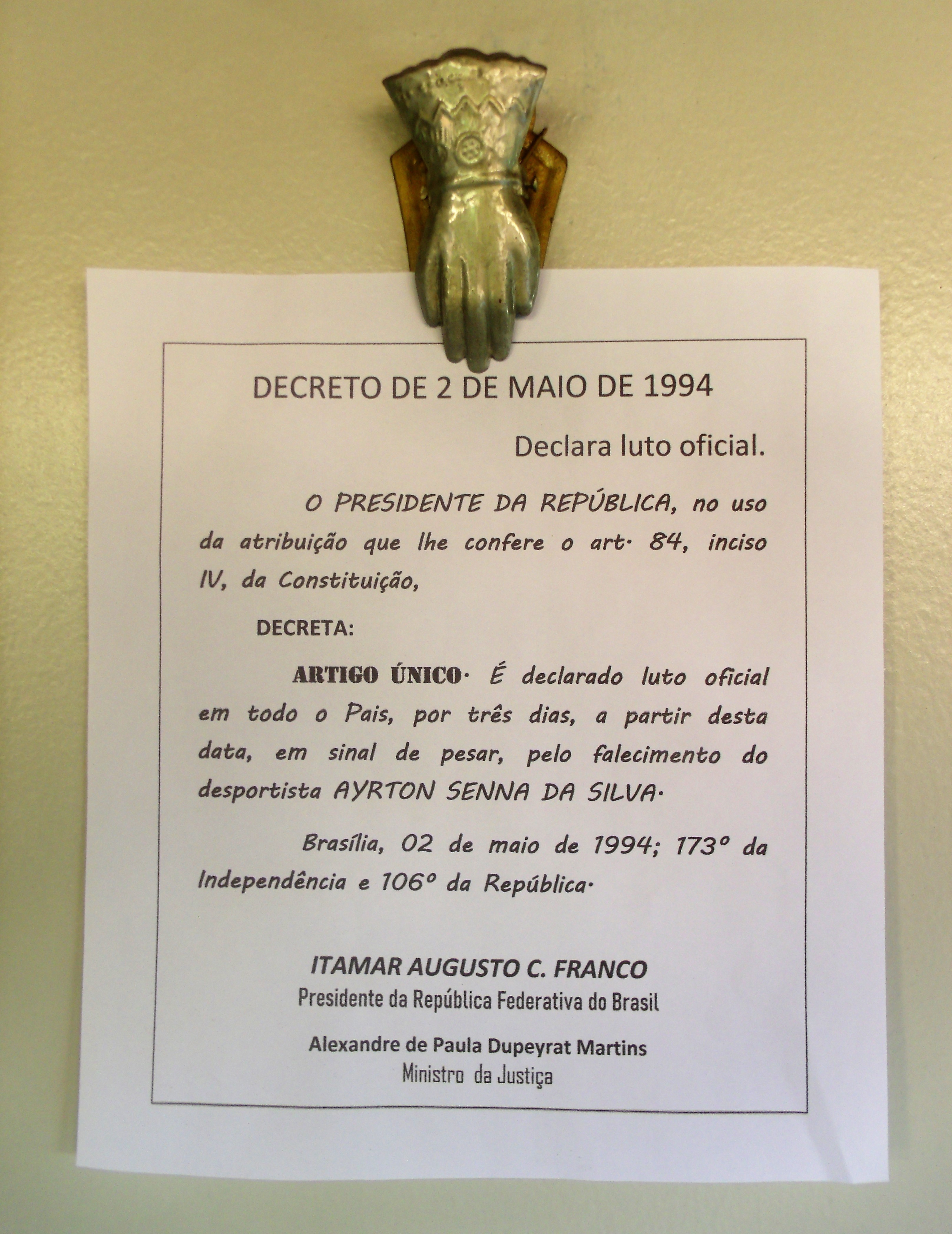 Decreto em que o Governo do Brasil declara luto nacional de três dias em pesar pela morde de Ayrton Senna.